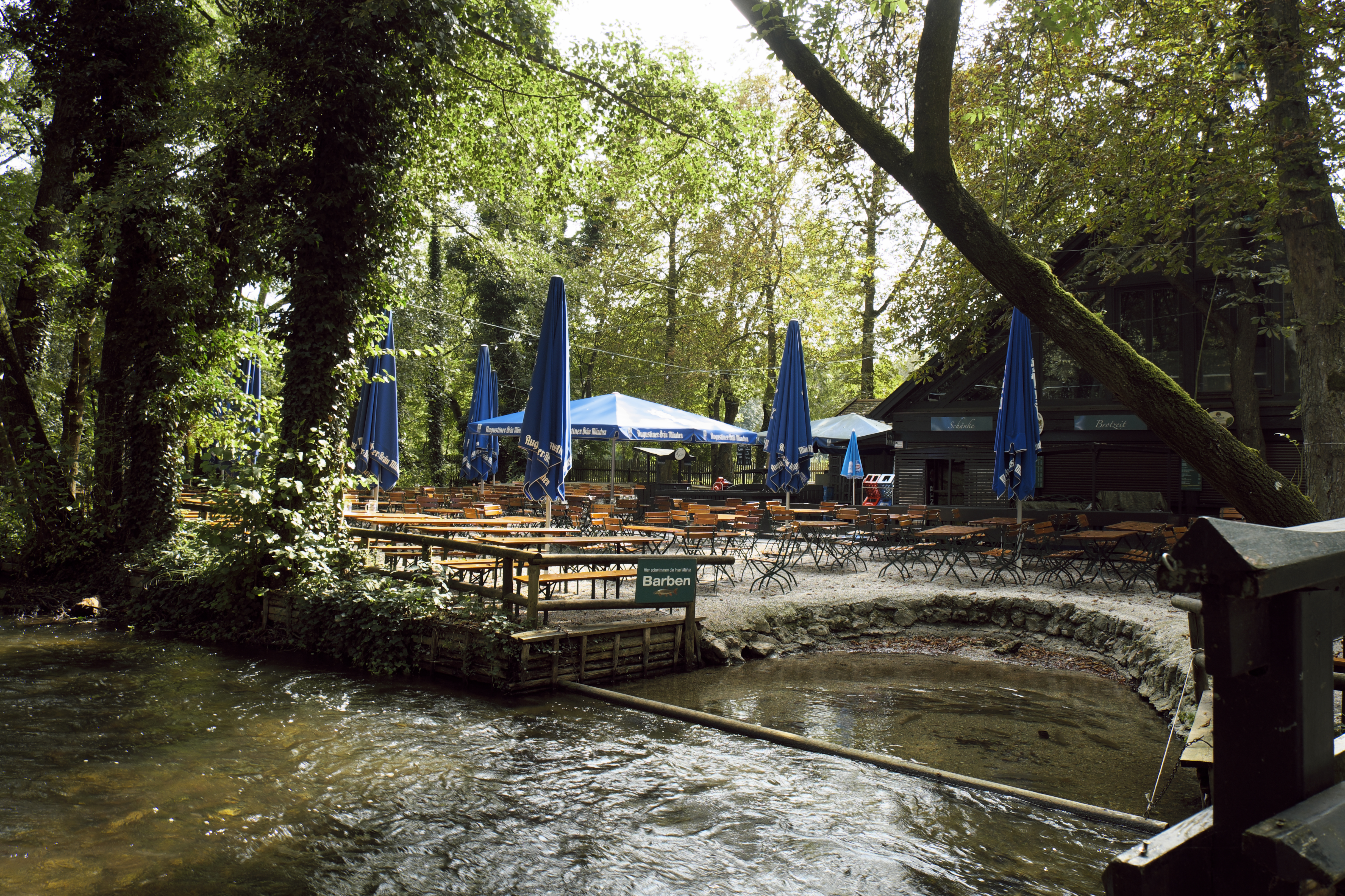 Biergarten Inselmühle in Untermenzing im Stadtbezirk Allach-Untermenzing in München (Bayern/Deutschland)